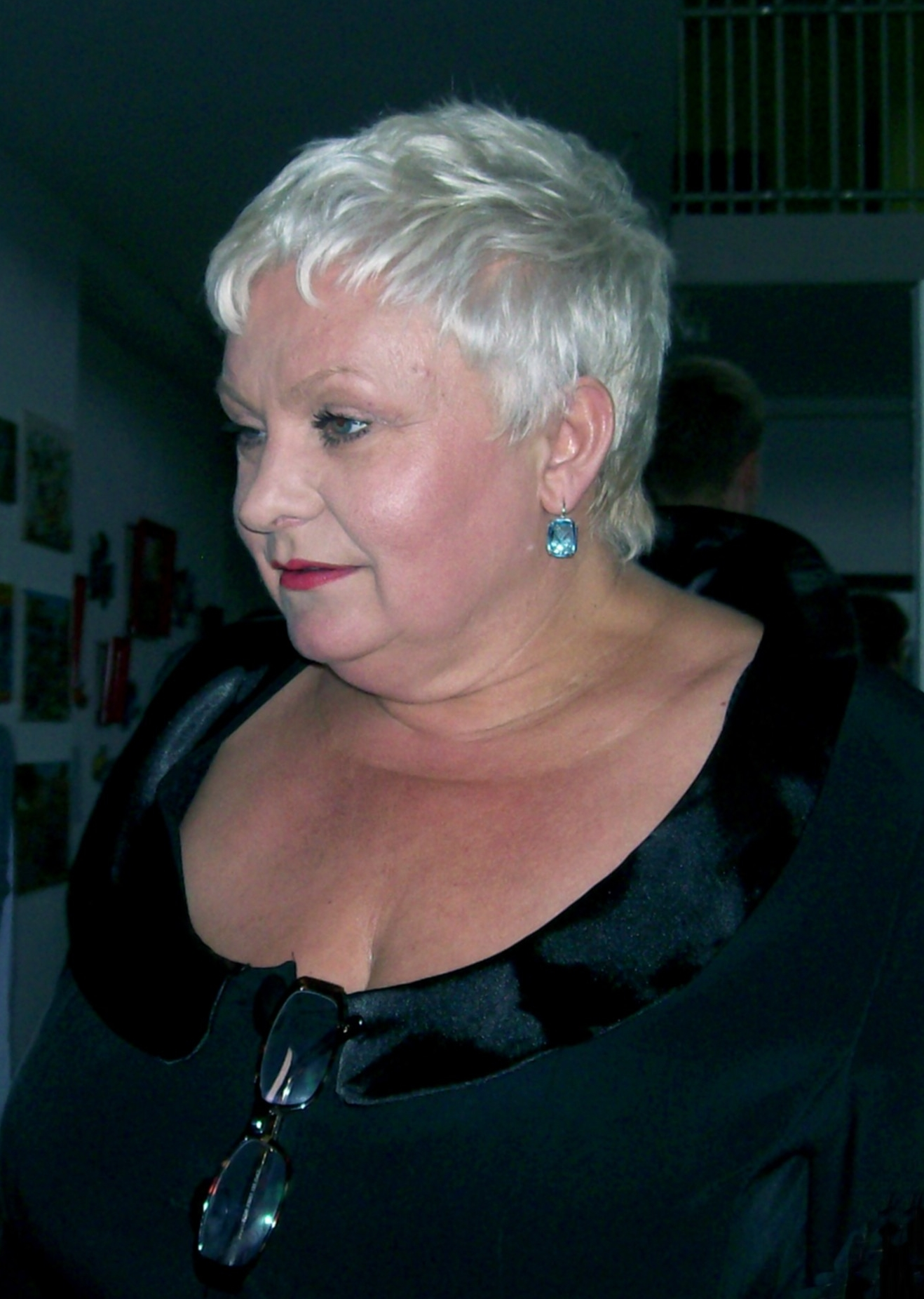 Joanna Bartel, aktorka, artystka kabaretowa, wokalistka, konferansjer, malarka.